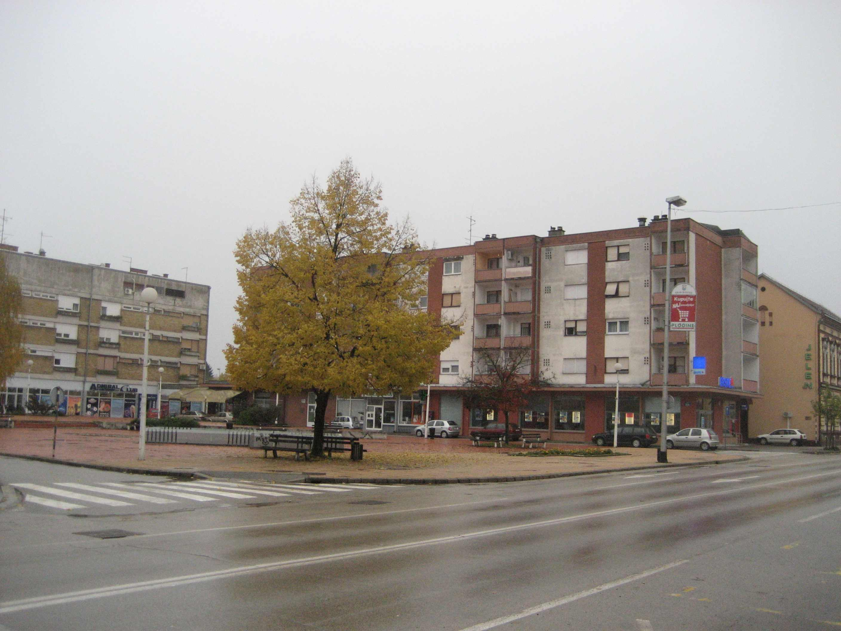 Marktplatz in Zupanja, Croatia